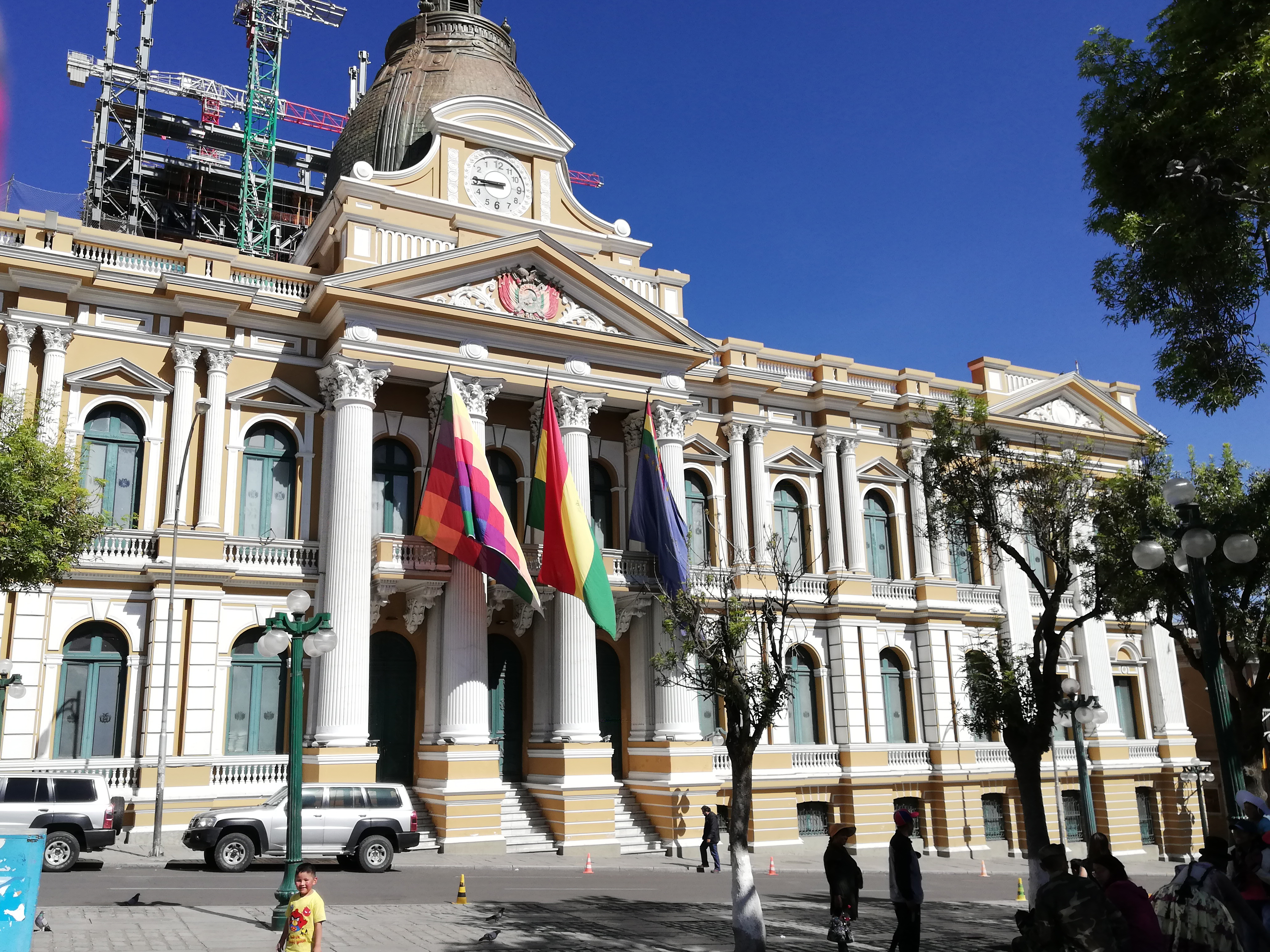 Palacio Legislativo This medium shows the protected monument with the number L/00-080 in Bolivia.